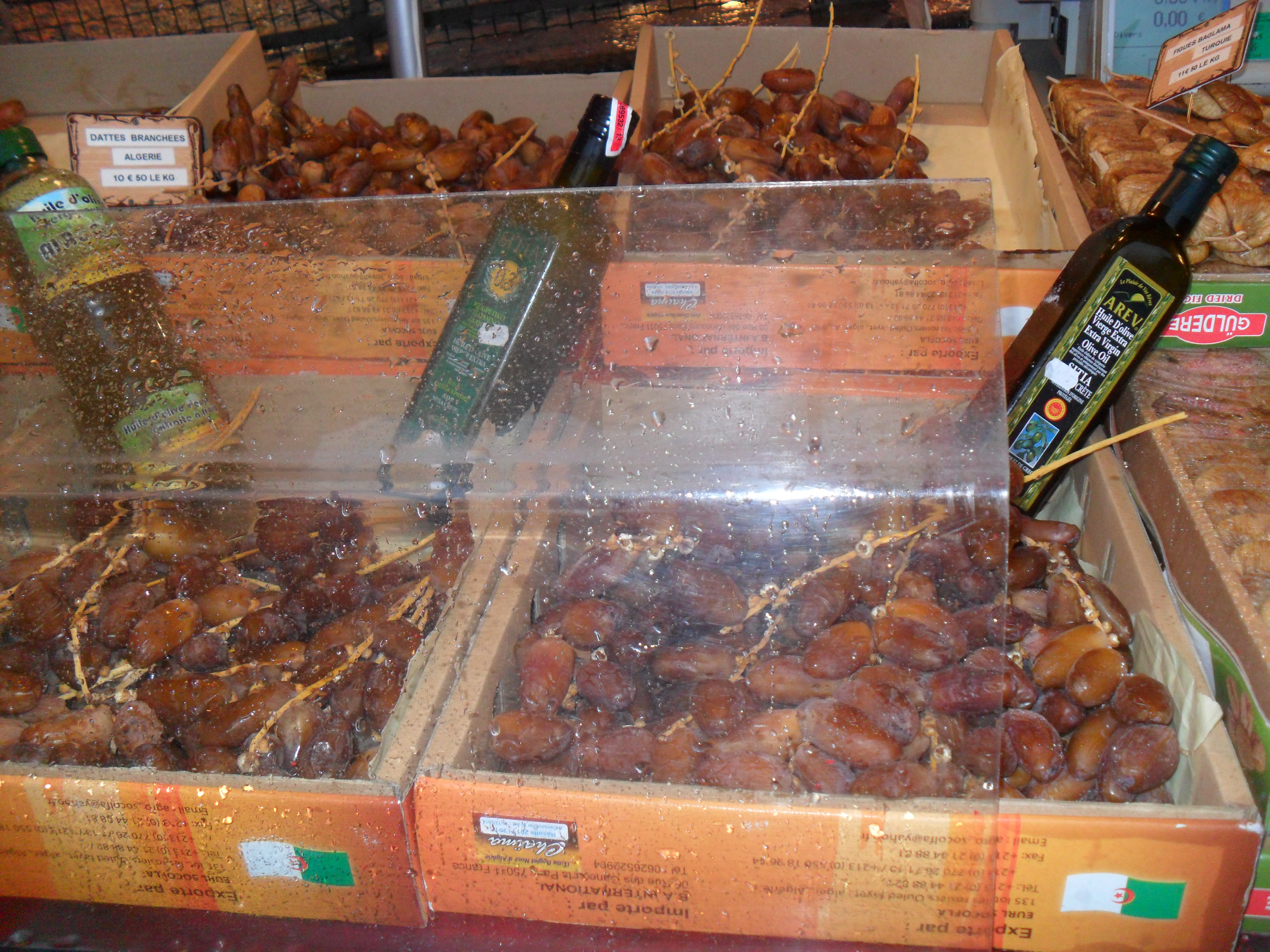 Marché de Morlaix: Deglet nour, La marque Algérienne en France: Hausse demande pour ça bonne qualité